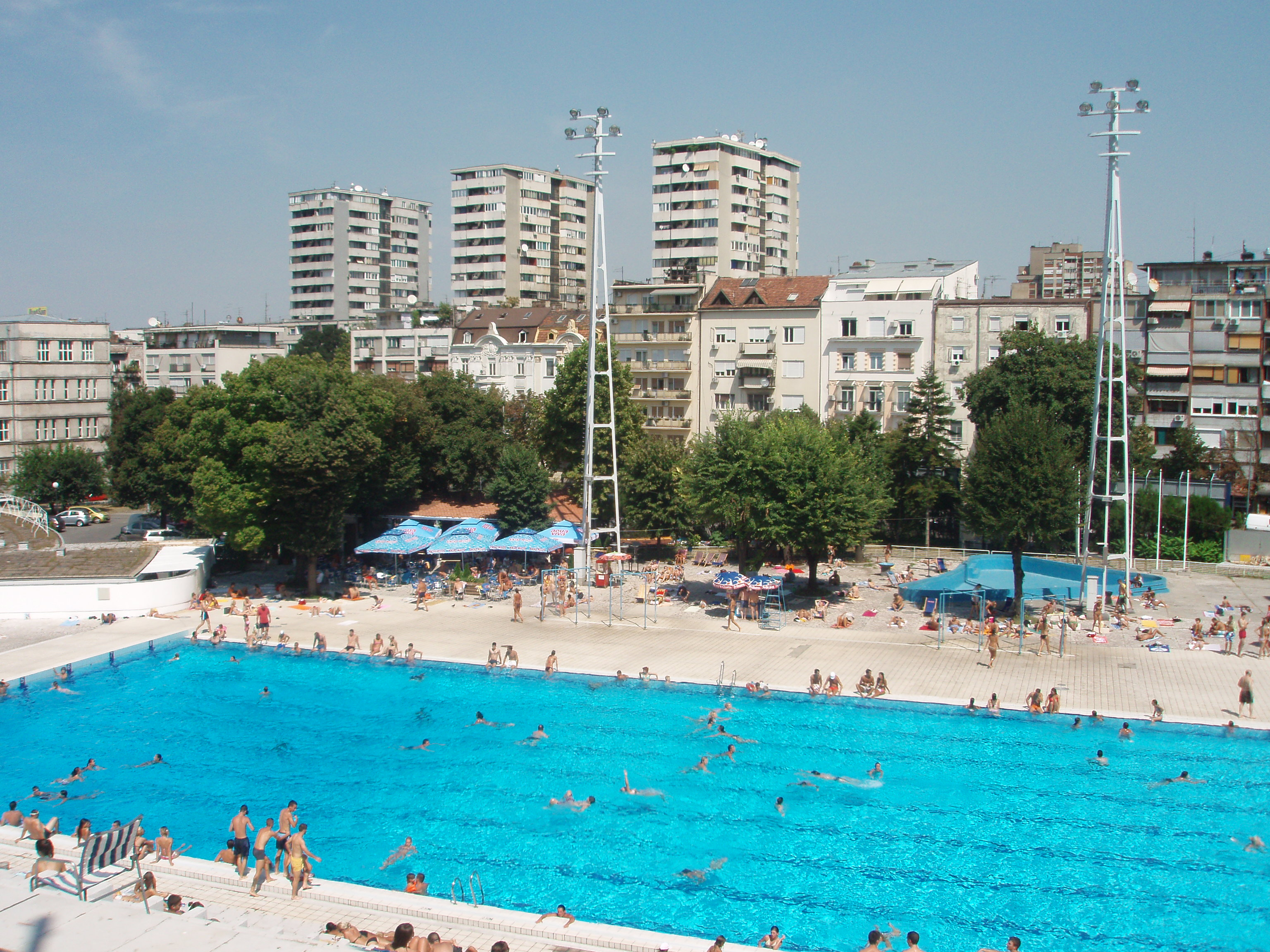 Sportski centar Tašmajdan